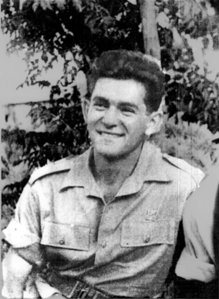 דיוקנו של דוד אלעזר בצעירותו